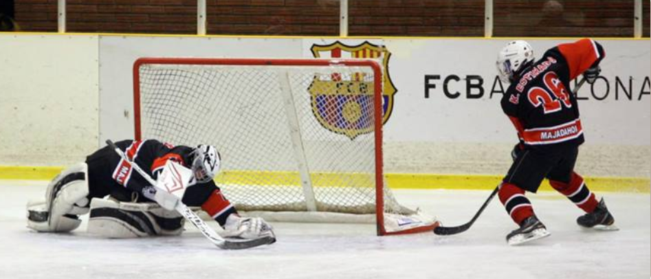 Copa del S.A.R El Príncipe 2014 celebrada en la Pista de hielo del F.C Barcelona